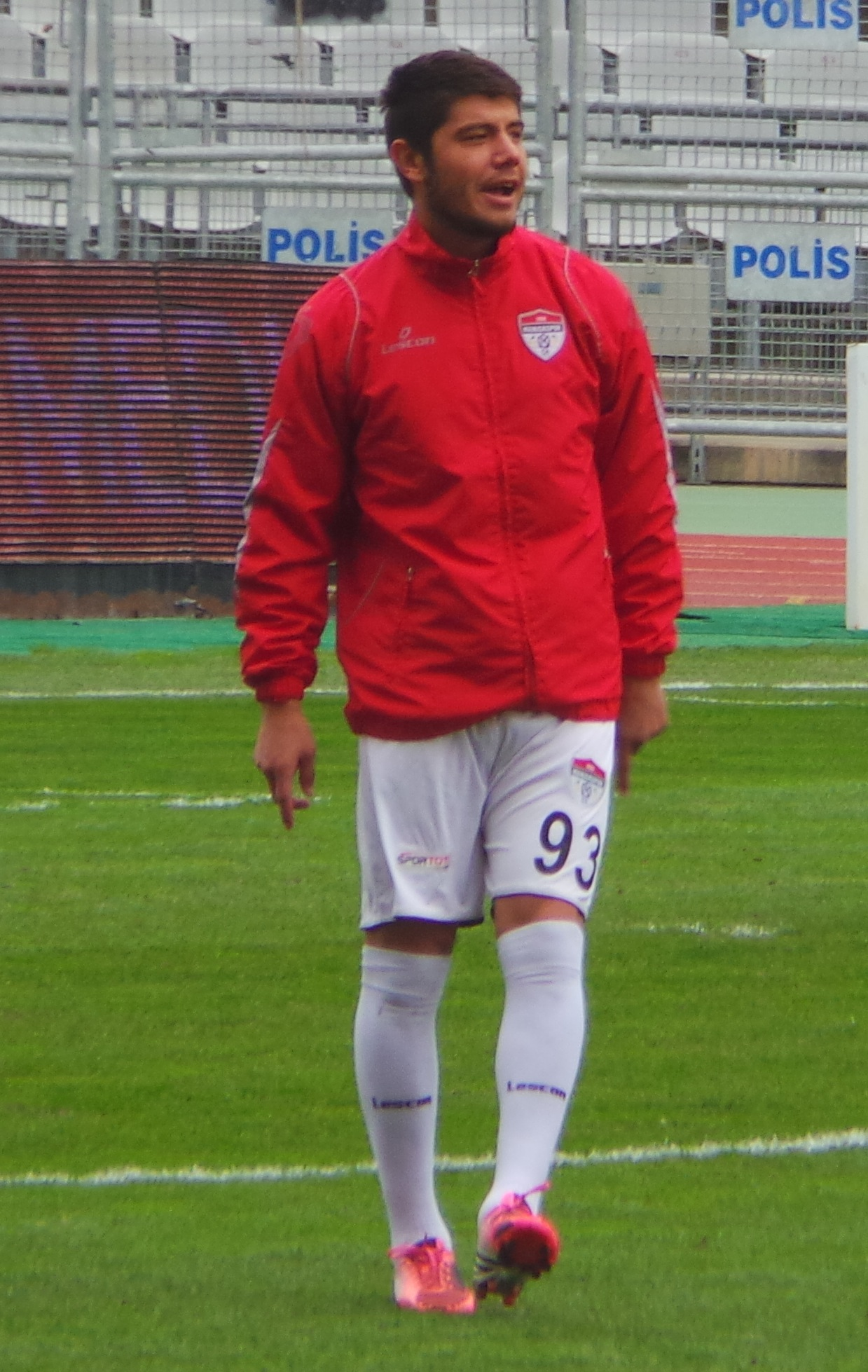 Ali Fırat Okur